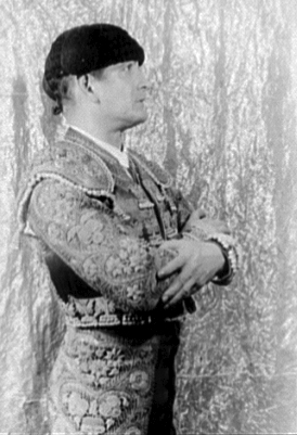 Bullfighter Sidney Franklin (1903-1976)Sidney Franklin